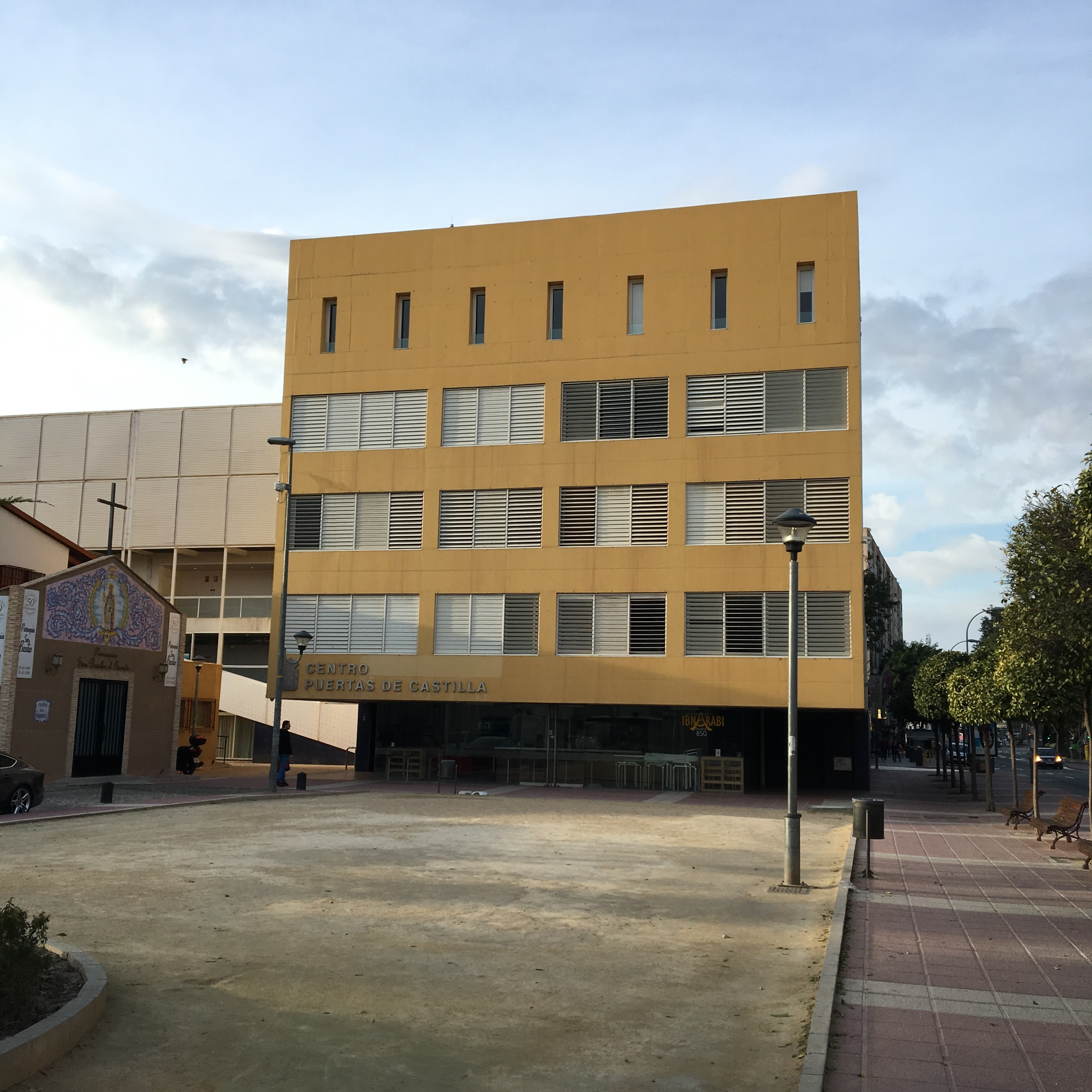 Centro Cultural Puertas de Castilla